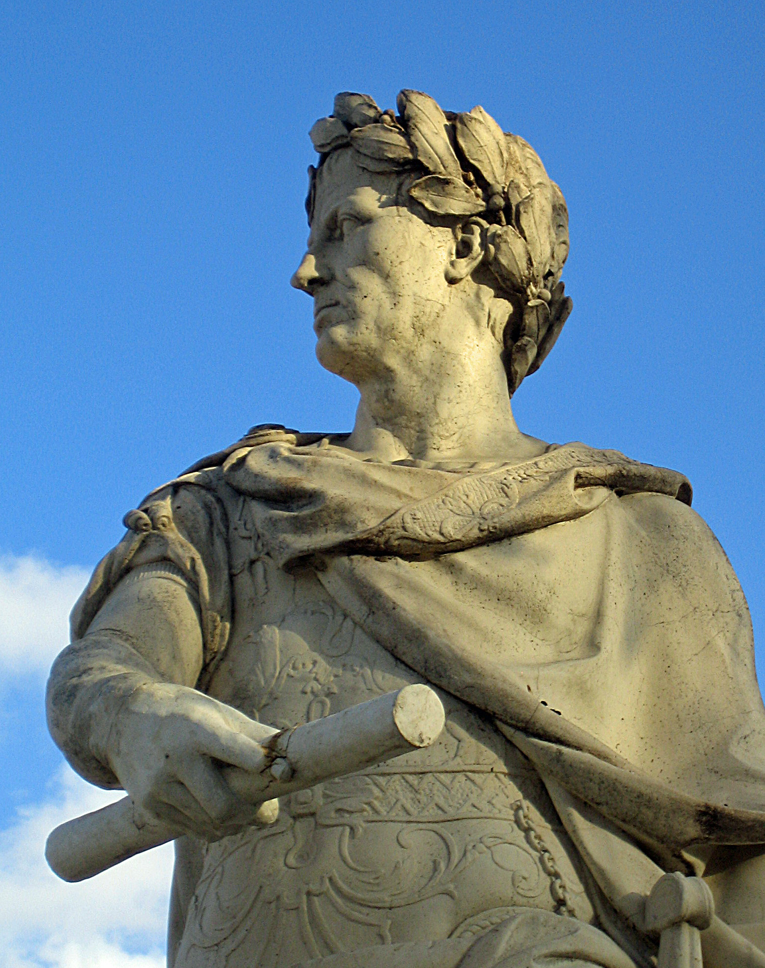 Statue de Jules Cesar par Nicolas Coustou dans le jardin des Tuileries à Paris.